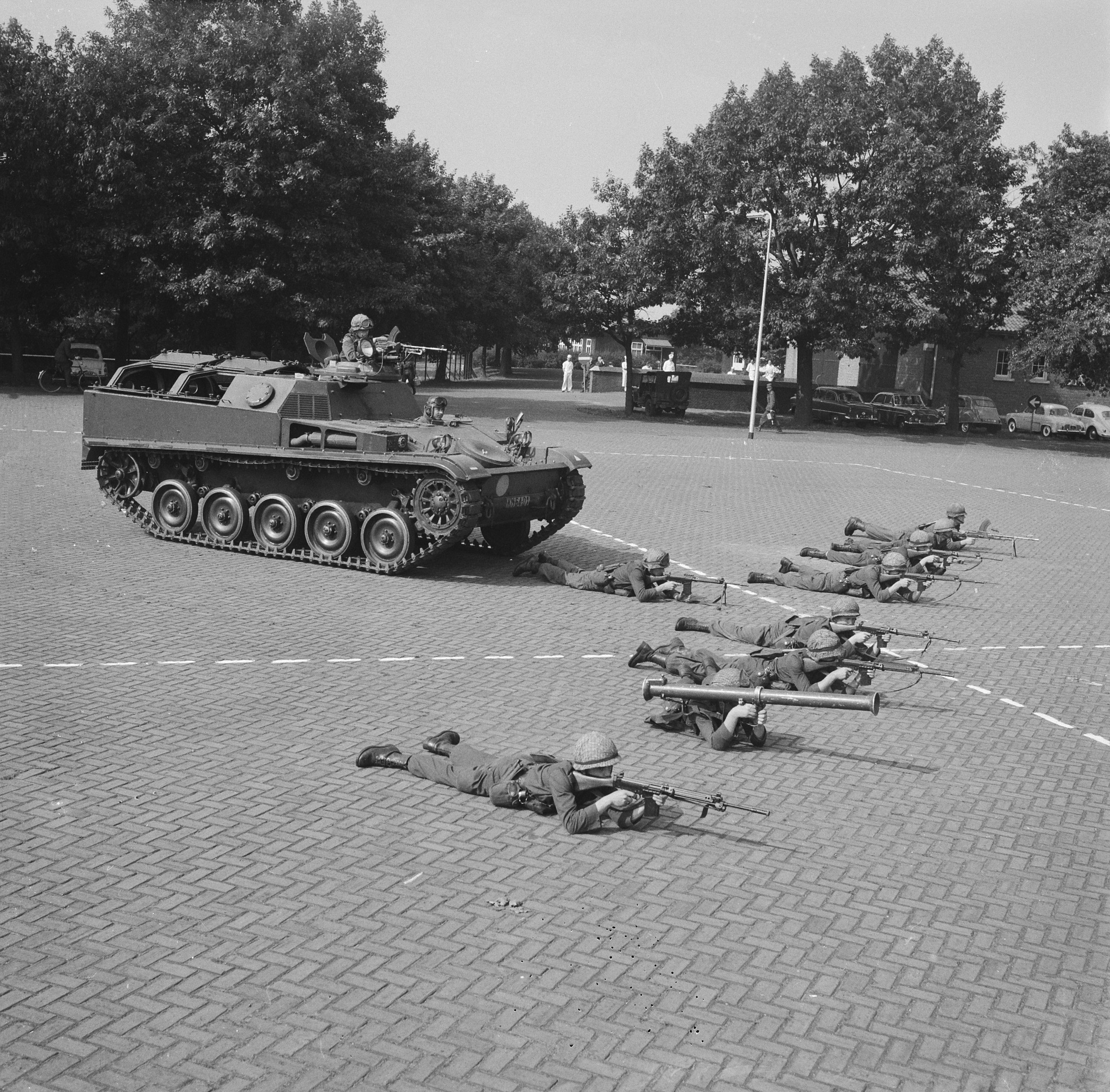 Collectie / Archief : Fotocollectie Anefo Reportage / Serie : [ onbekend ] Beschrijving : Dag der Infanterie in de Isabellakazerne te Den Bosch Datum : 13 september 1962 Locatie : Den Bosch Trefwoorden : INFANTERIE Persoonsnaam : Isabellakazerne Fotograaf : Nijs, Jac. de / Anefo Auteursrechthebbende : Nationaal Archief Materiaalsoort : Negatief (zwart/wit) Nummer archiefinventaris : bekijk toegang 2.24.01.03 Bestanddeelnummer : 914-3104